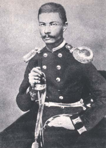 Romuald Traugutt (1826-1864)